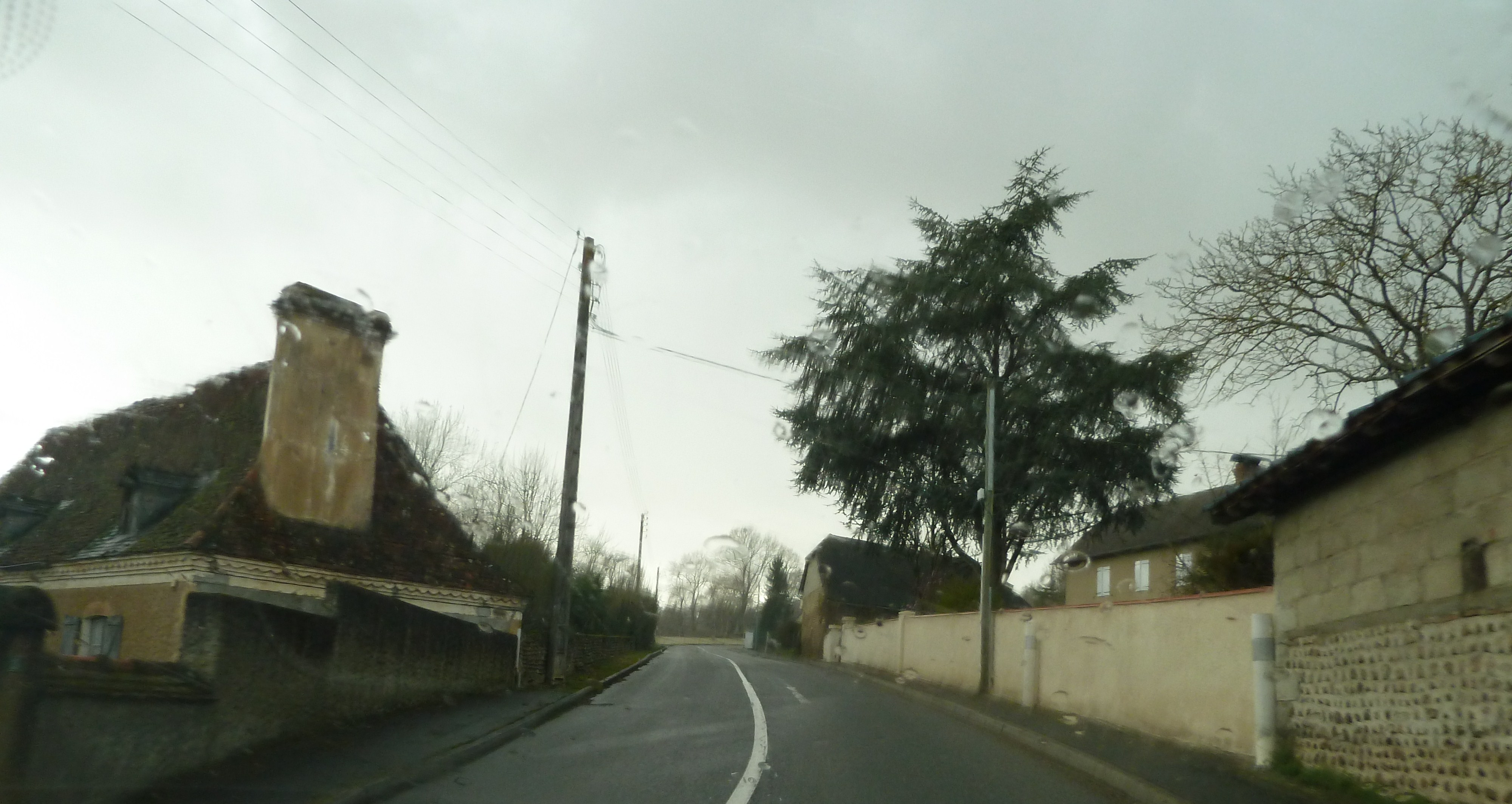 Baleix